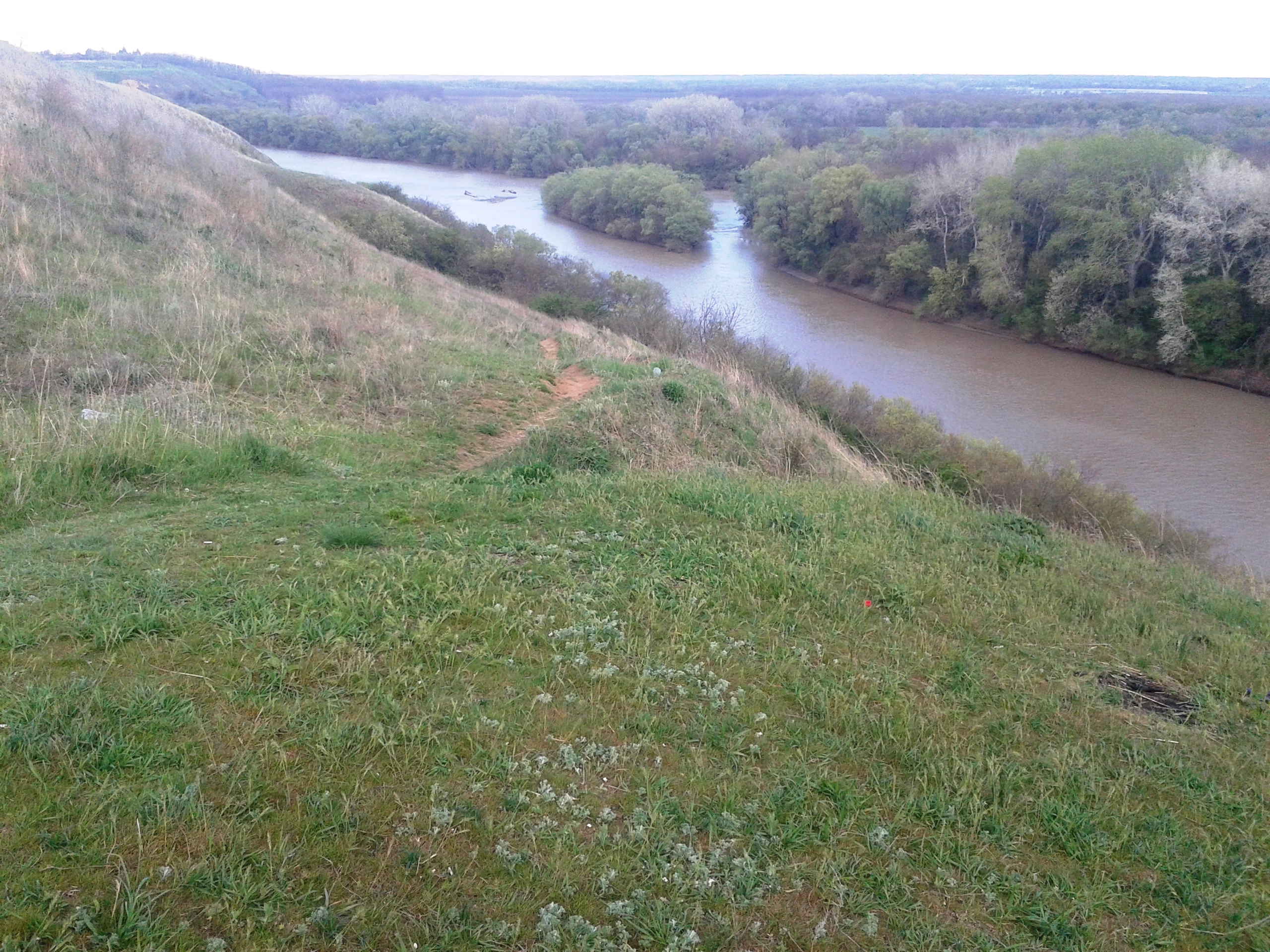 Острова, Тбилисский район, станица Тбилисская, спуск к реке с улицы Шпилевой.Большой остров, и маленький остров "Дельфинчик" названный местными ребятами. This image is related to the protected area of Russia number 2310451